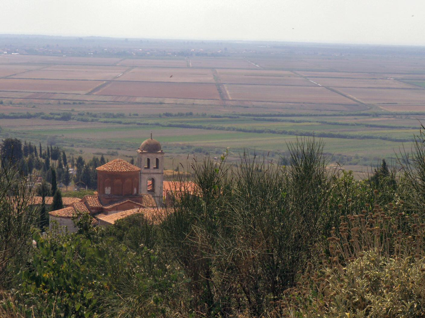 Apollonia - Driving Albania 175